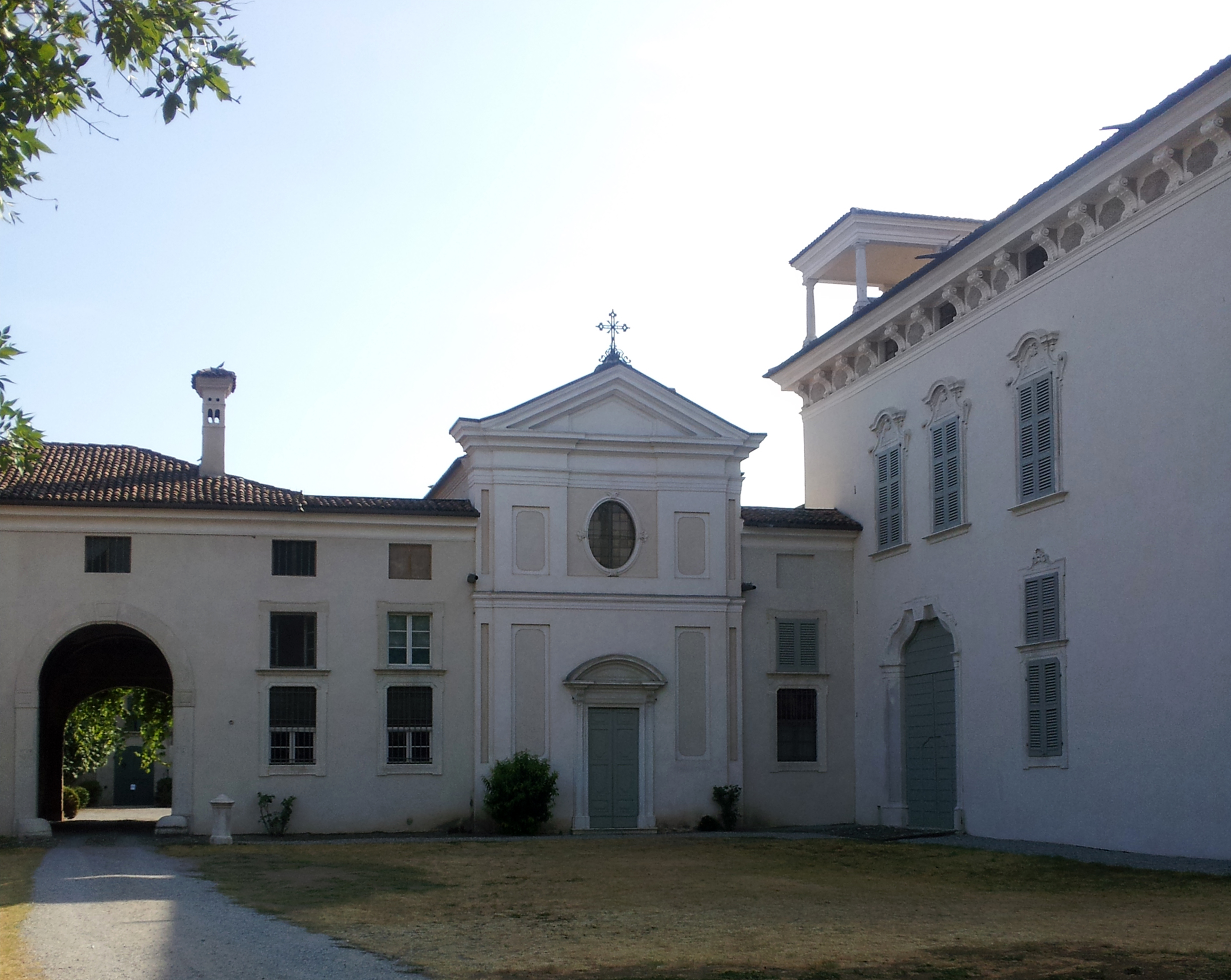 Oratorio di Palazzo Lechi a Montirone